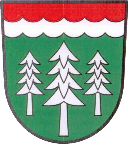 Horní Paseka, znak obce